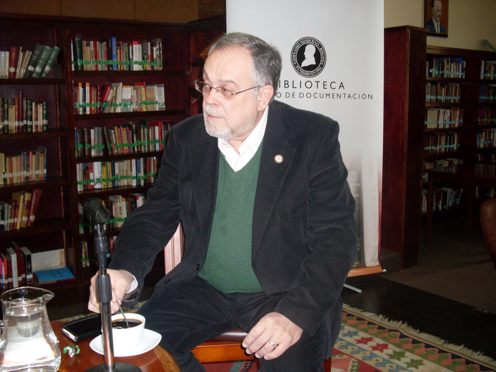 Mempo Giardinelli, escritor argentino.